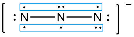 叠氮根离子